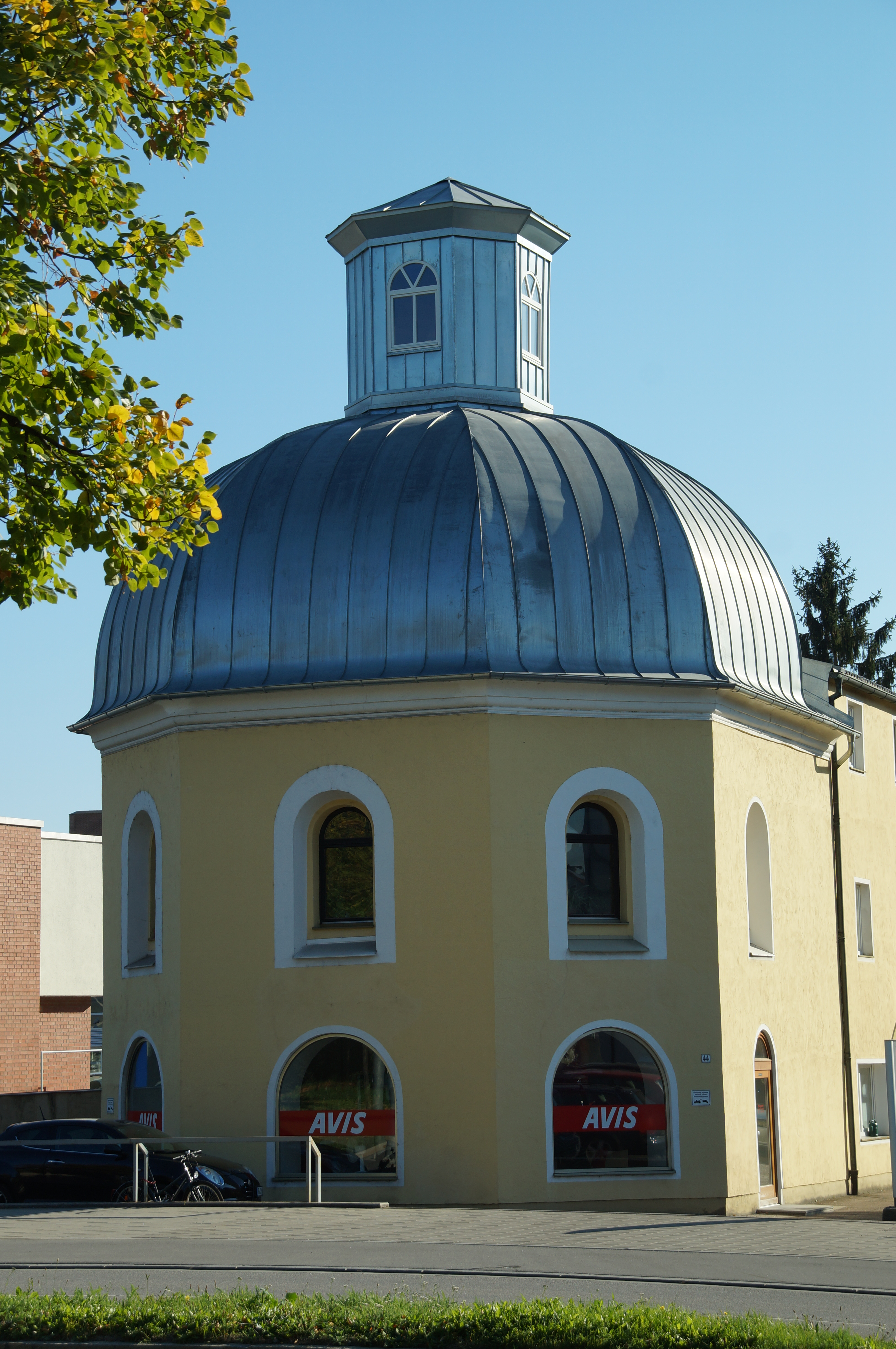 Ehem. Siechenkapelle Alt-St. Niklas, achteckiger Zentralbau mit Welscher Haube und Laterne, 1. Hälfte 17. Jh. auf Grundlage von 1454, 1873 und 1954 verändert. nachqualifiziert